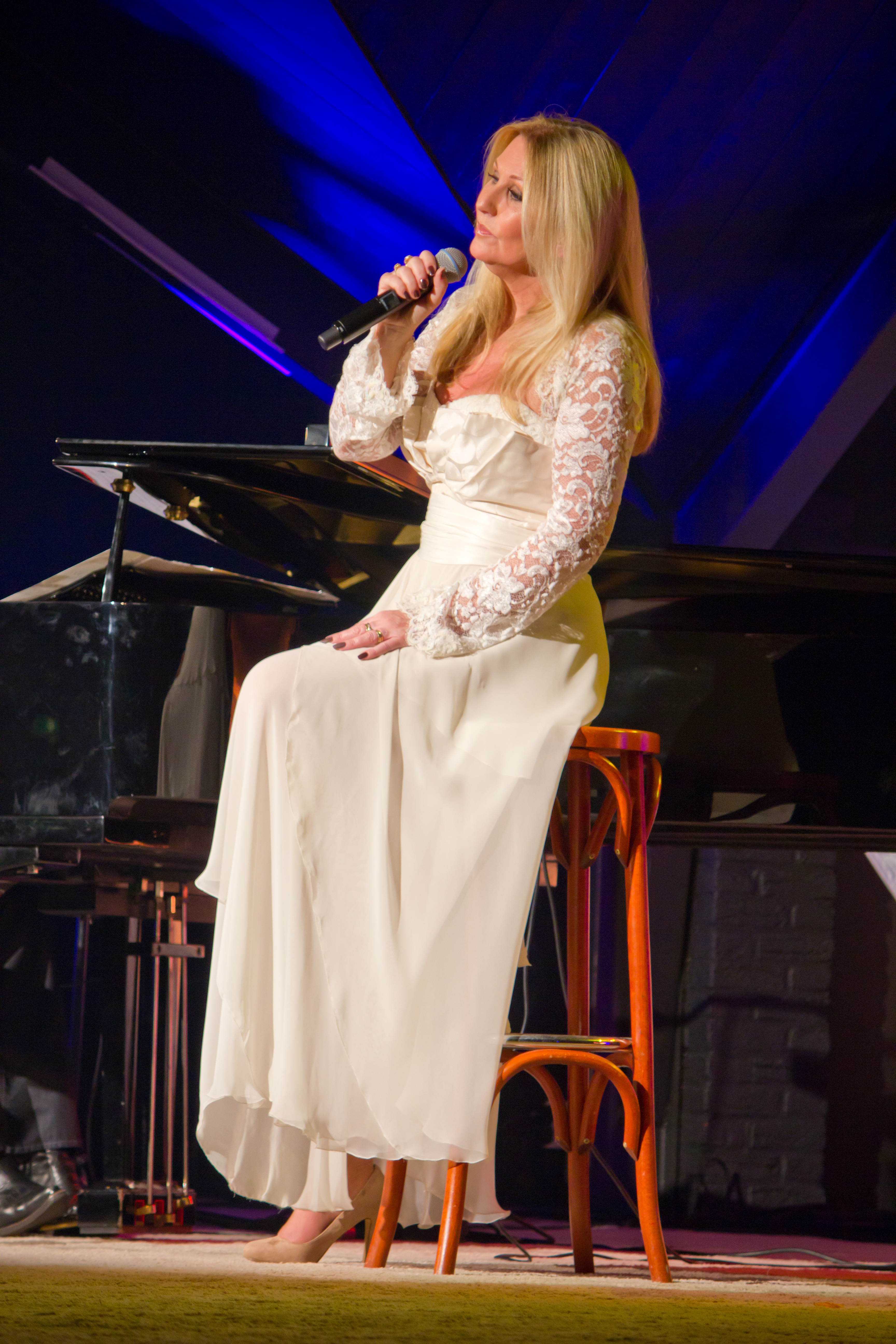 Vechtdalconcert Dalfsen